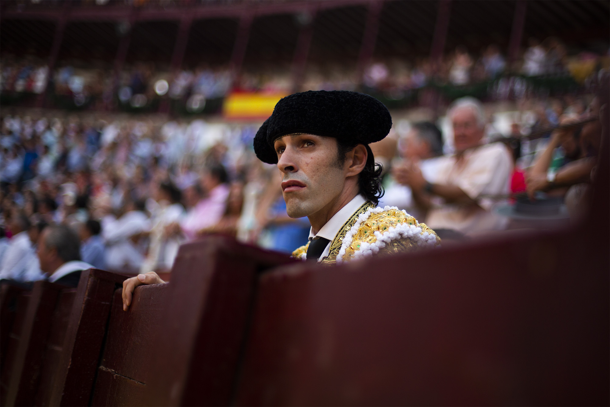 Alejandro Talavante esperando la salida de un toro en el callejón.